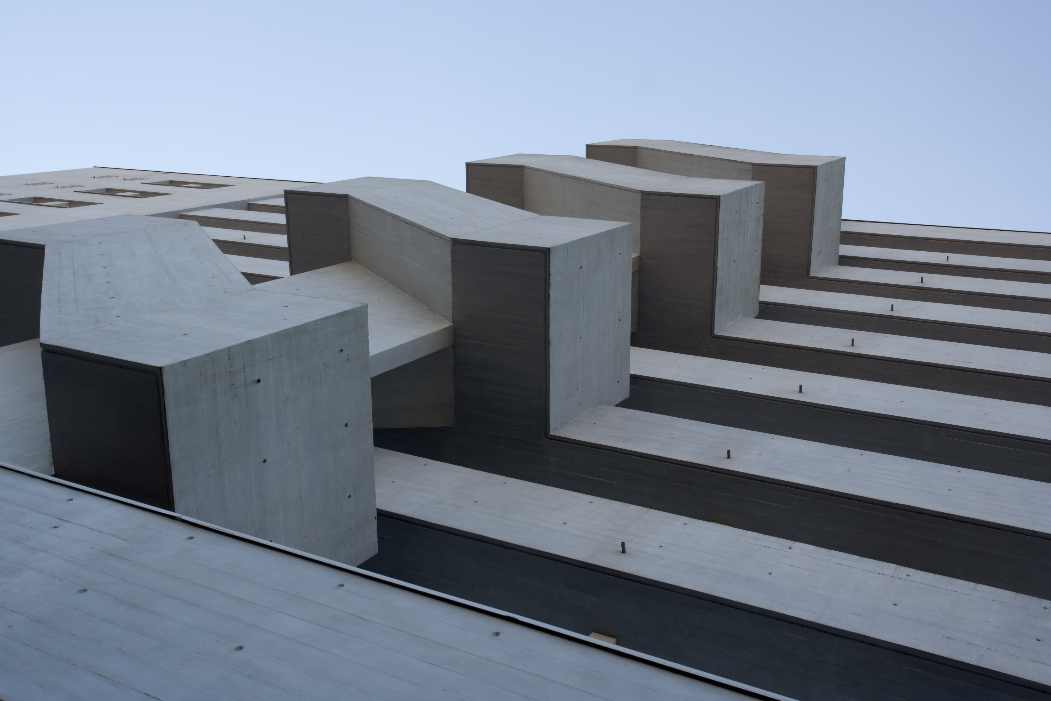 Nordfassade vom Bahnhof Altstetten in Zürich, Schweiz